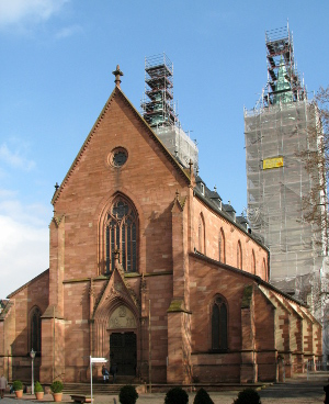 St.-Gallus-Kirche in Ladenburg